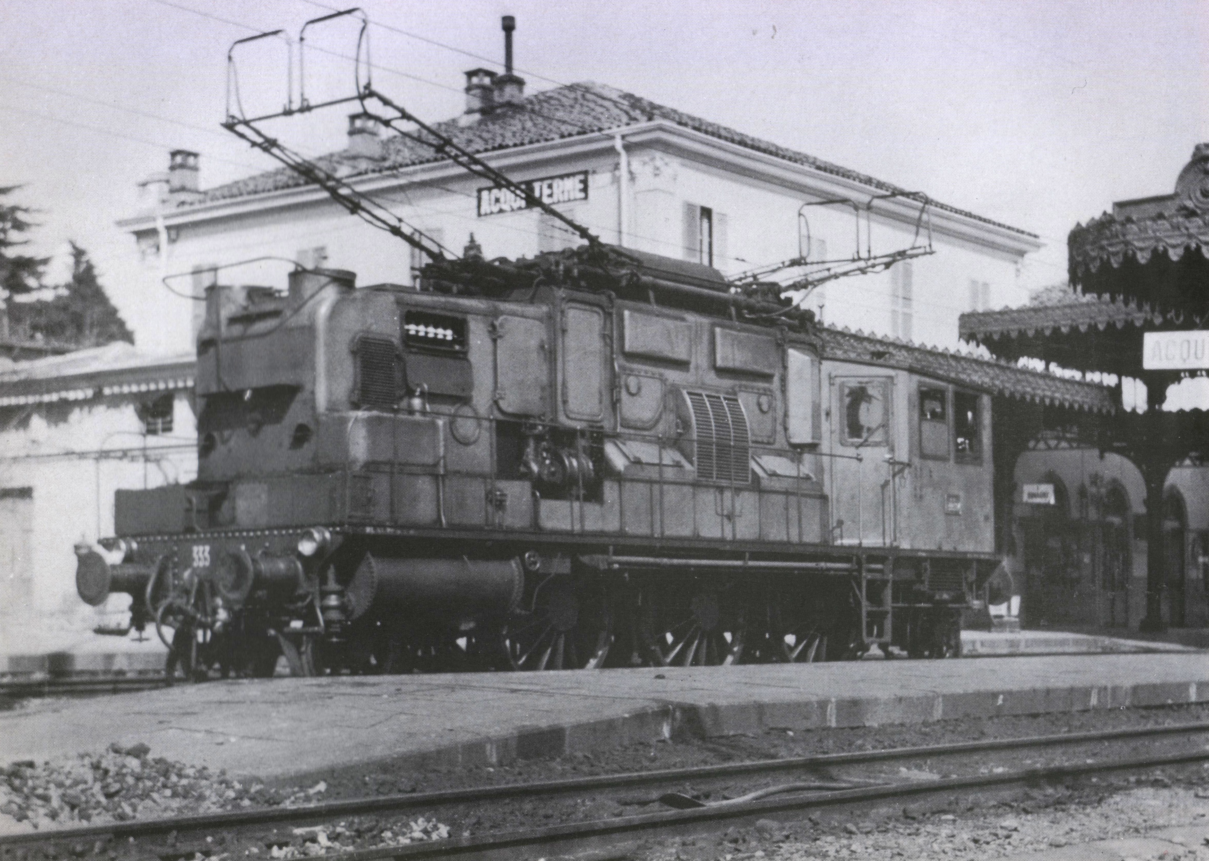 E333-004, stazione di Acqui Terme, anni 1950